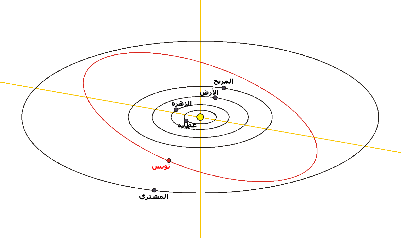 صورة كويكب تونس في 20 ديسمبر 2007